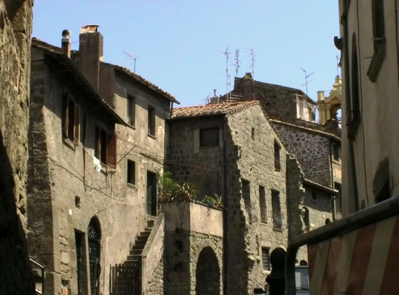 Viterbo, Lazio, Italia